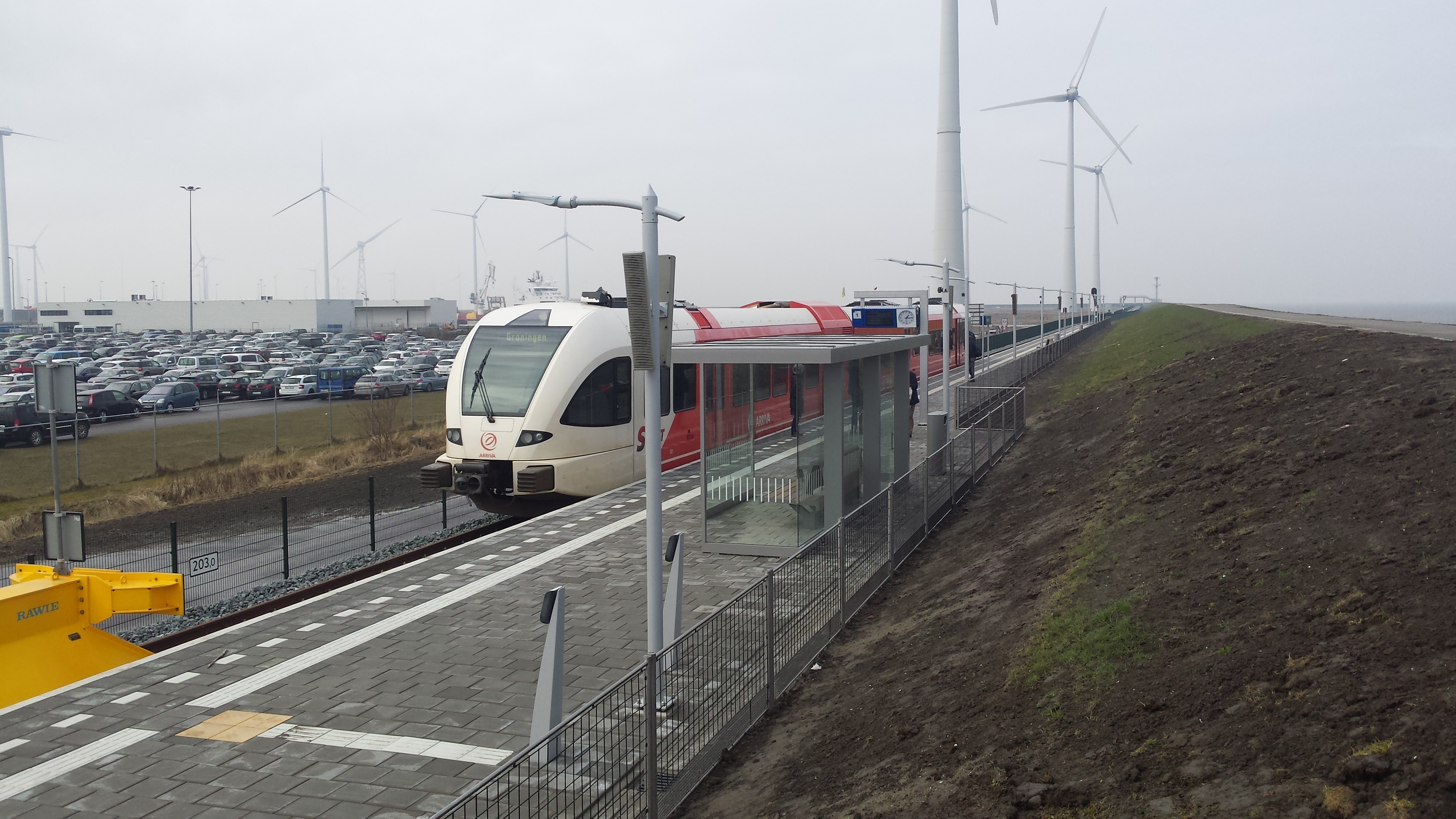 Het noordelijkste station van Nederland, Eemshaven. Een paar dagen na de opening. (Gemeente Eemsmond, Groningen)